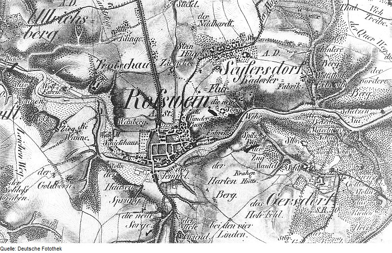 Original image description from the Deutsche Fotothek Roßwein. Oberreit, Sect. Freiberg, vor 1843